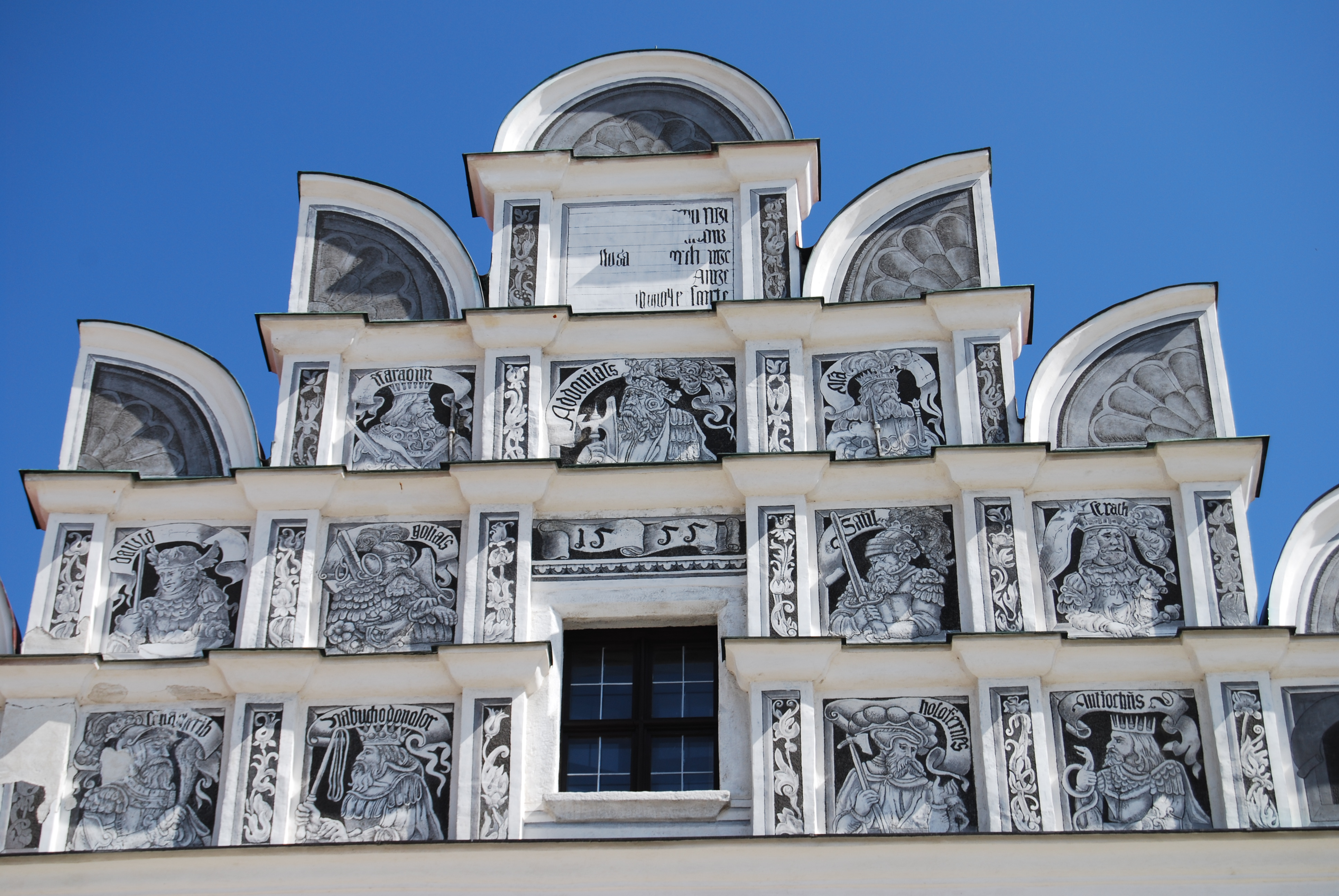 .Náměstí v Telči.Detail průčelí domu.Telč.Okres Jihlava.Česko.